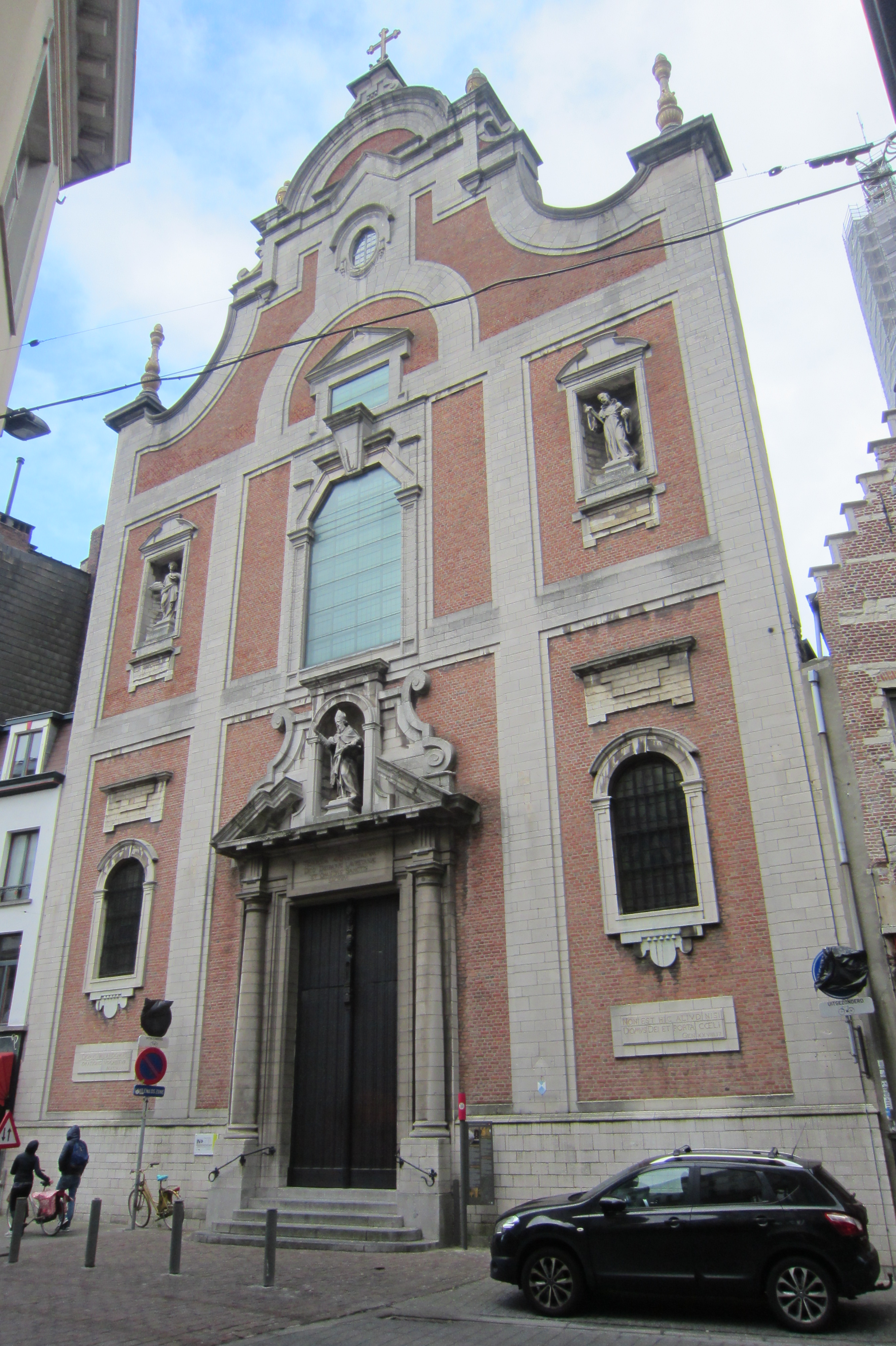 Sint-Augustinuskerk, Kammenstraat 73, Antwerpen; voorgevel ontworpen door Wenzel Coeberger